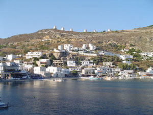 Porzh Panteli.